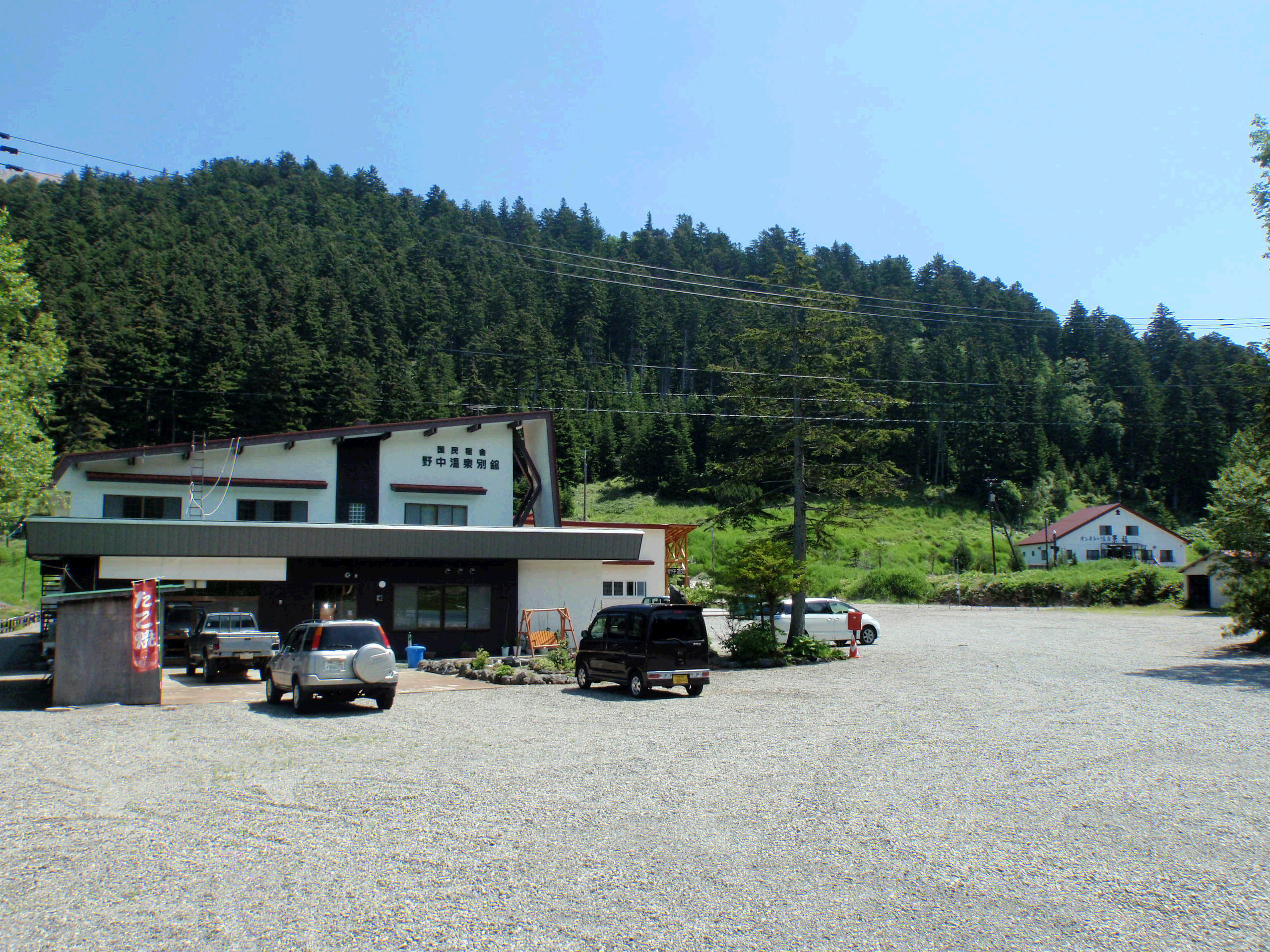 雌阿寒温泉。左手前が国民宿舎「野中温泉 別館」、その右に僅かに見えているのが日帰り入浴施設「野中温泉」、右奥が民宿「オンネトー温泉 景福」